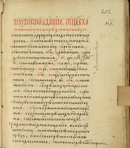 Чин исповеданию. Служебник и Требник, полууст., напис. 1474 года